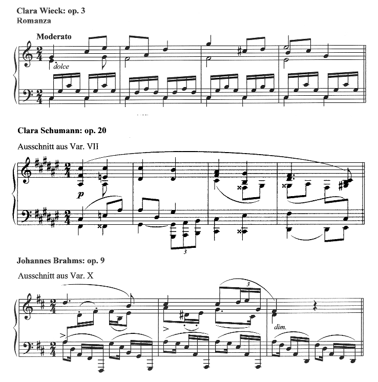 Das Themna von Clara Wiecks op. 3, Zitate in Clara Schumanns op. 20 und Johannes Brahms' op. 9